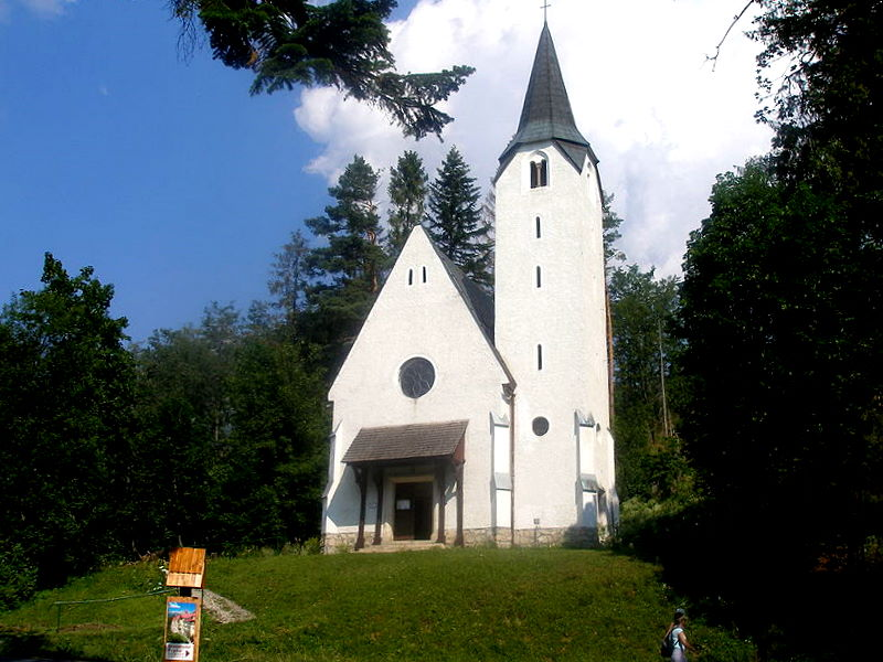 Evanjelícky kostol v osade Tatranská Lomnica, mesto Vysoké Tatry.